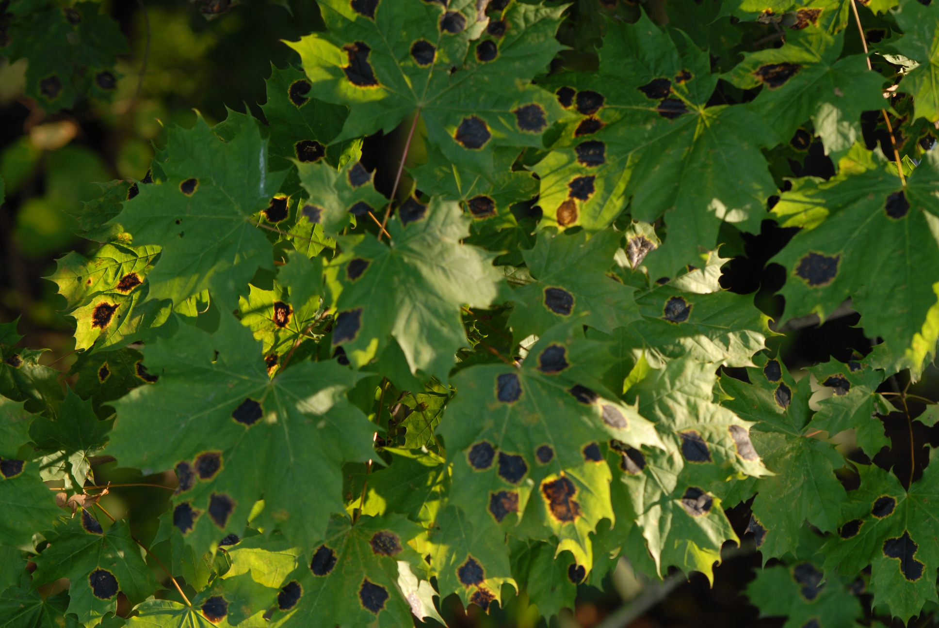 Teerflecken an Spitzahorn